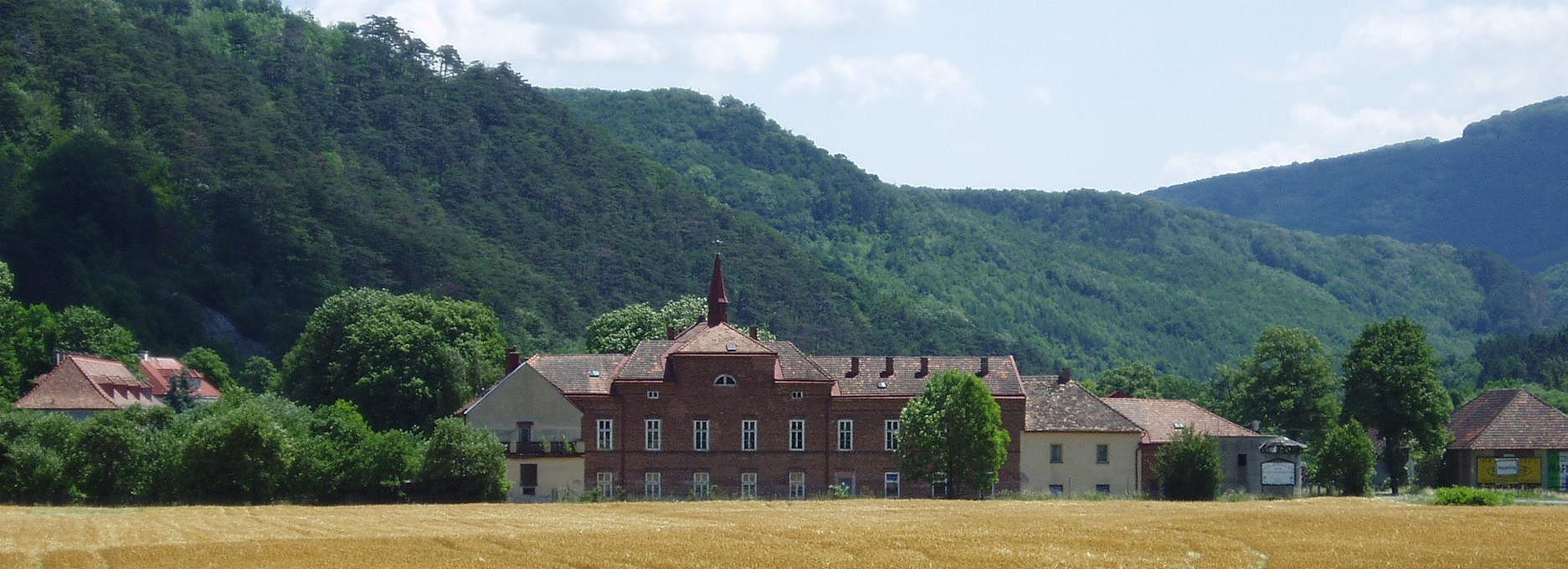 Mayerling Panorama nach Osten.